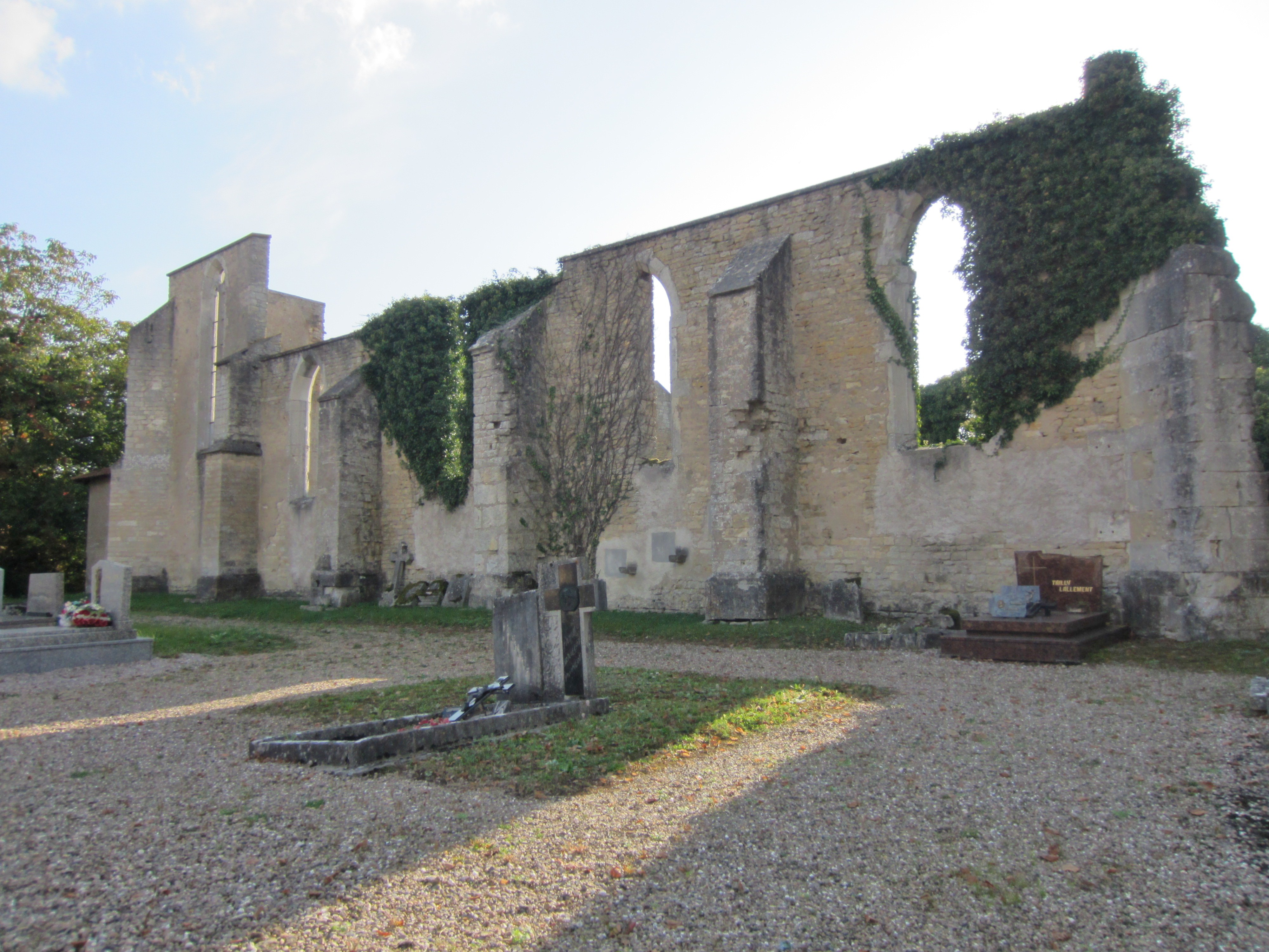 Description ancienne église Flirey Date29 September 2011Sourcemon appareil photoAuthorAimelaimePermission(Reusing this file) ancienne église Flirey